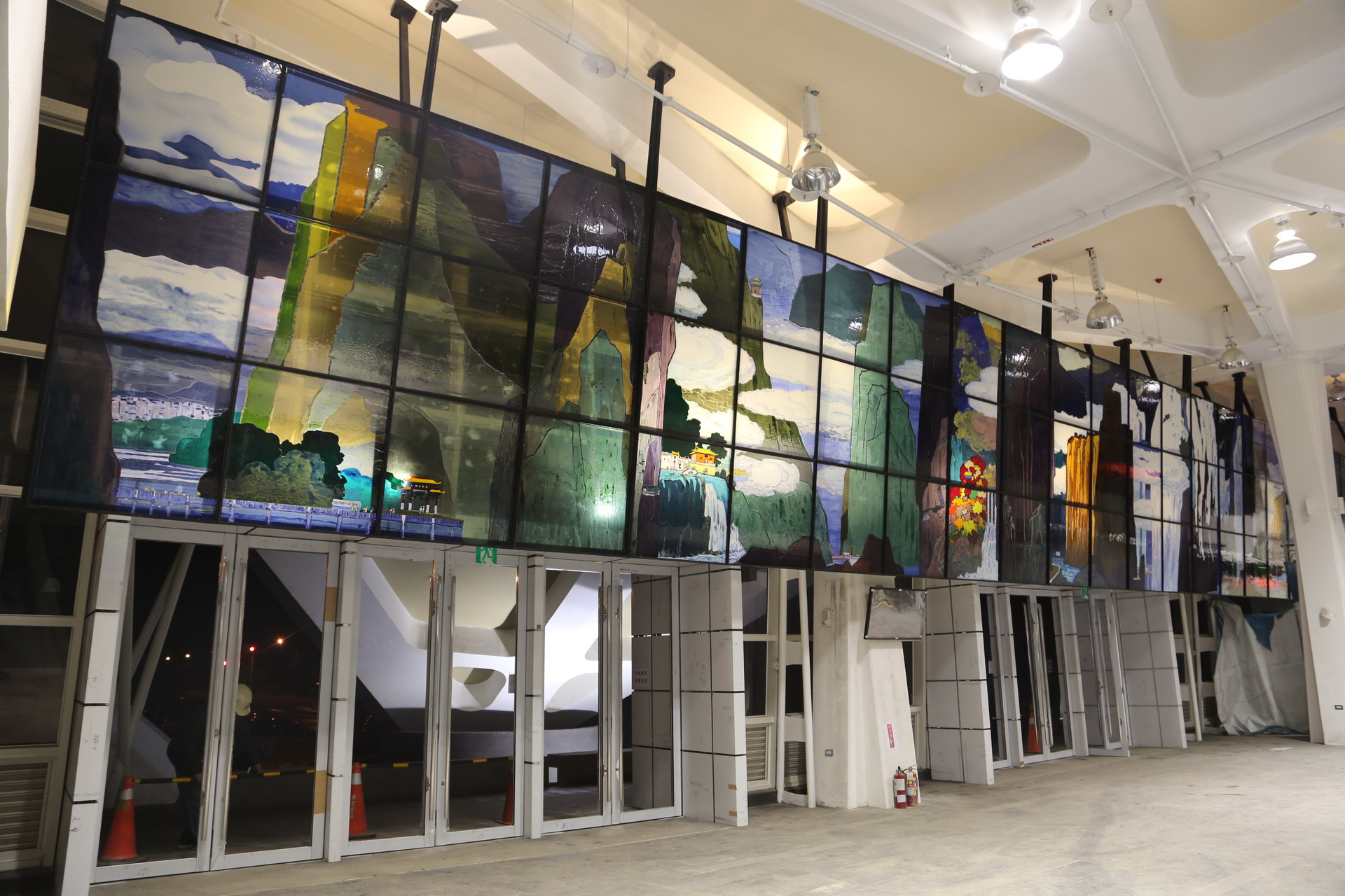 太魯閣之美